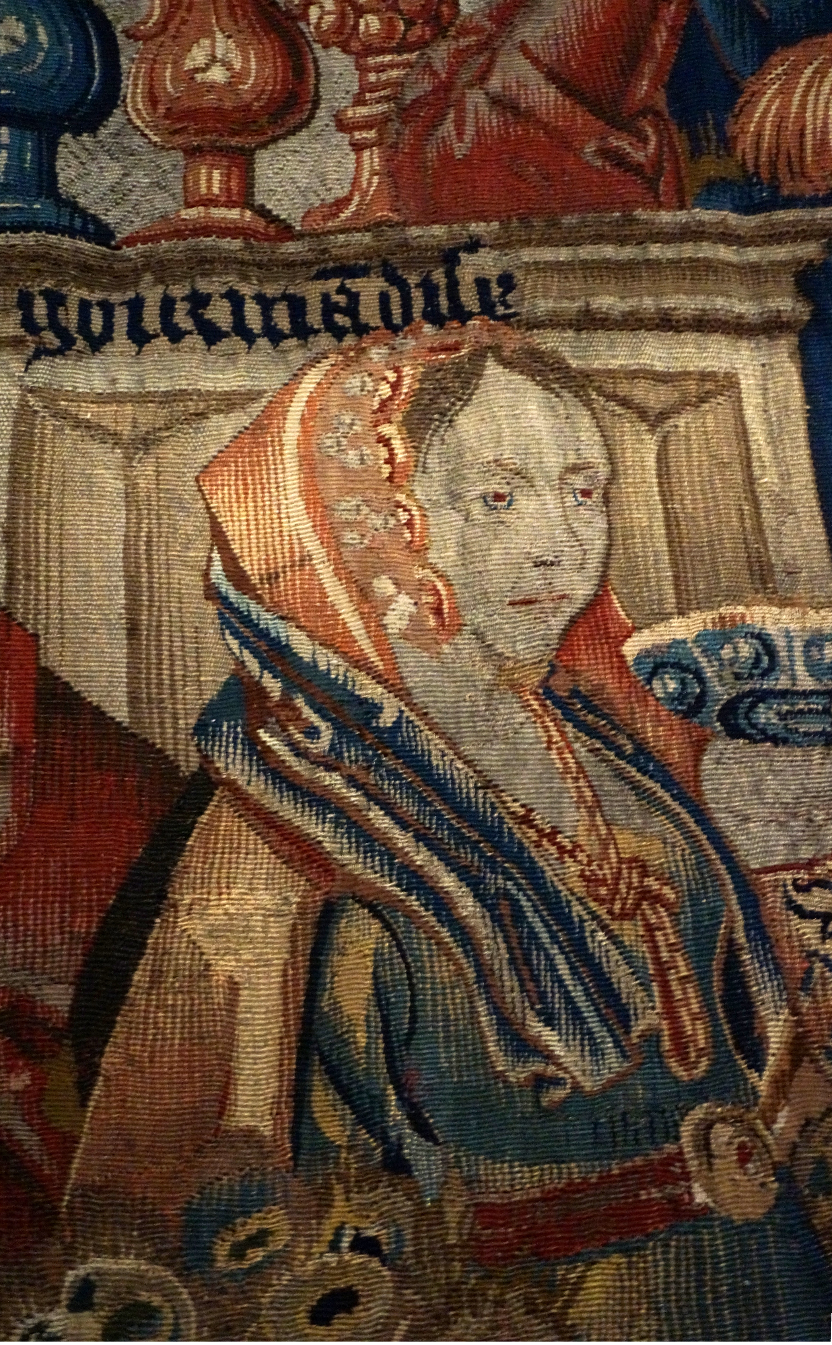 détail des tapisserie du musée lorrain.